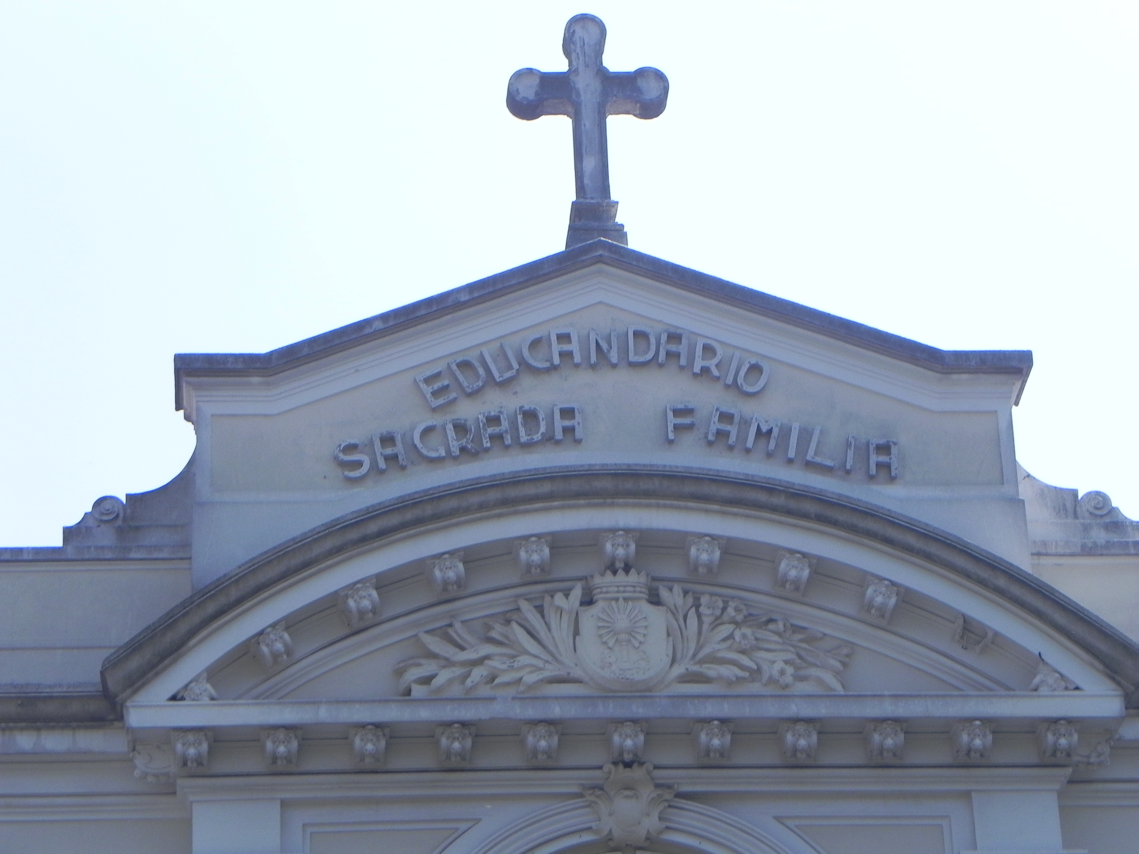 Detalhes da fachada do prédio Educandário Sagrada Família